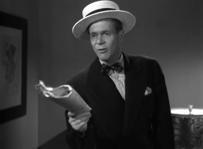 「飾窓の女」におけるダン・デュリエ